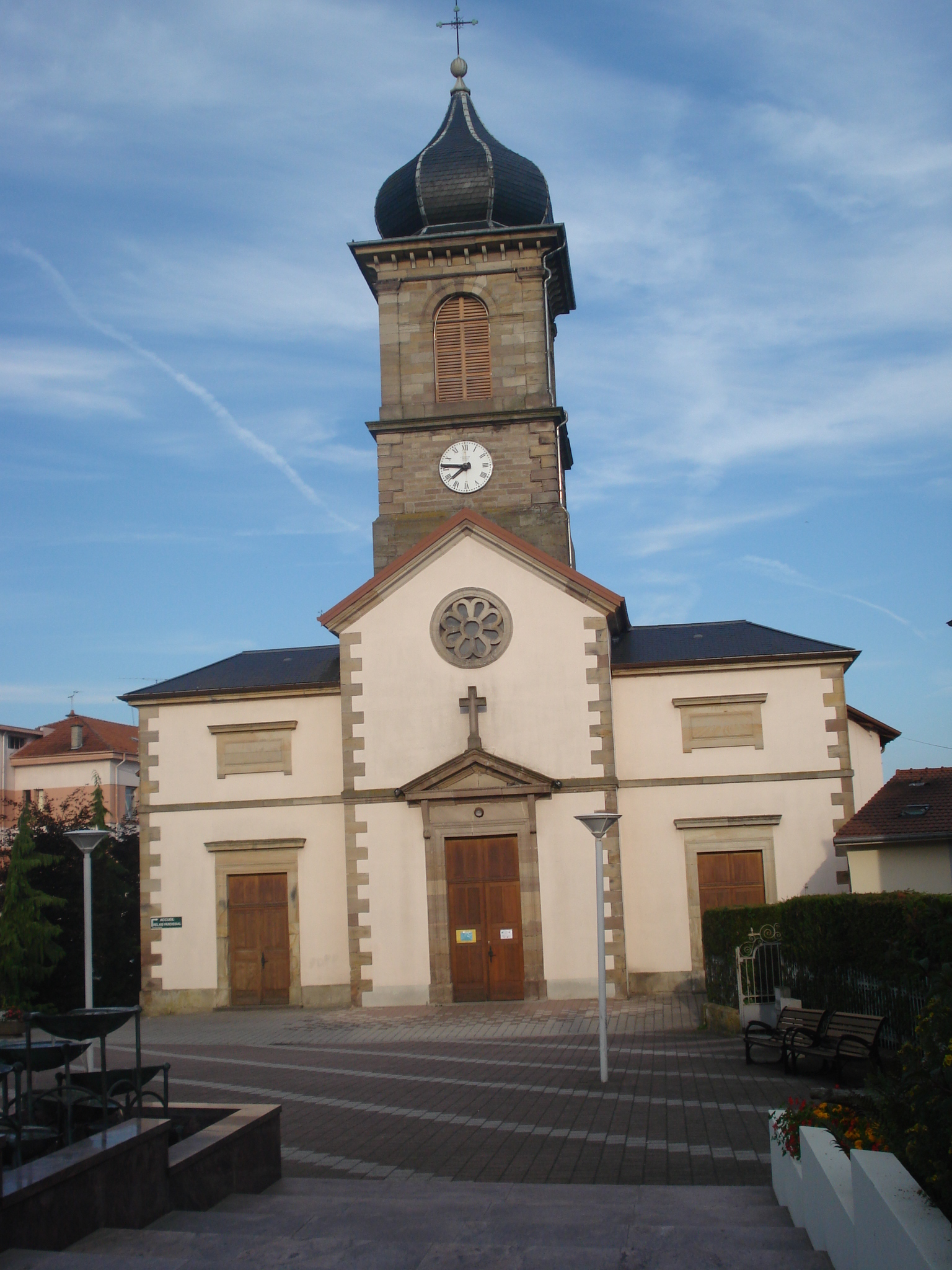 église de Golbey en Lorraine